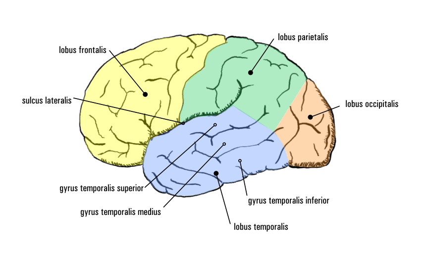 Gehirn lateral, Lobi